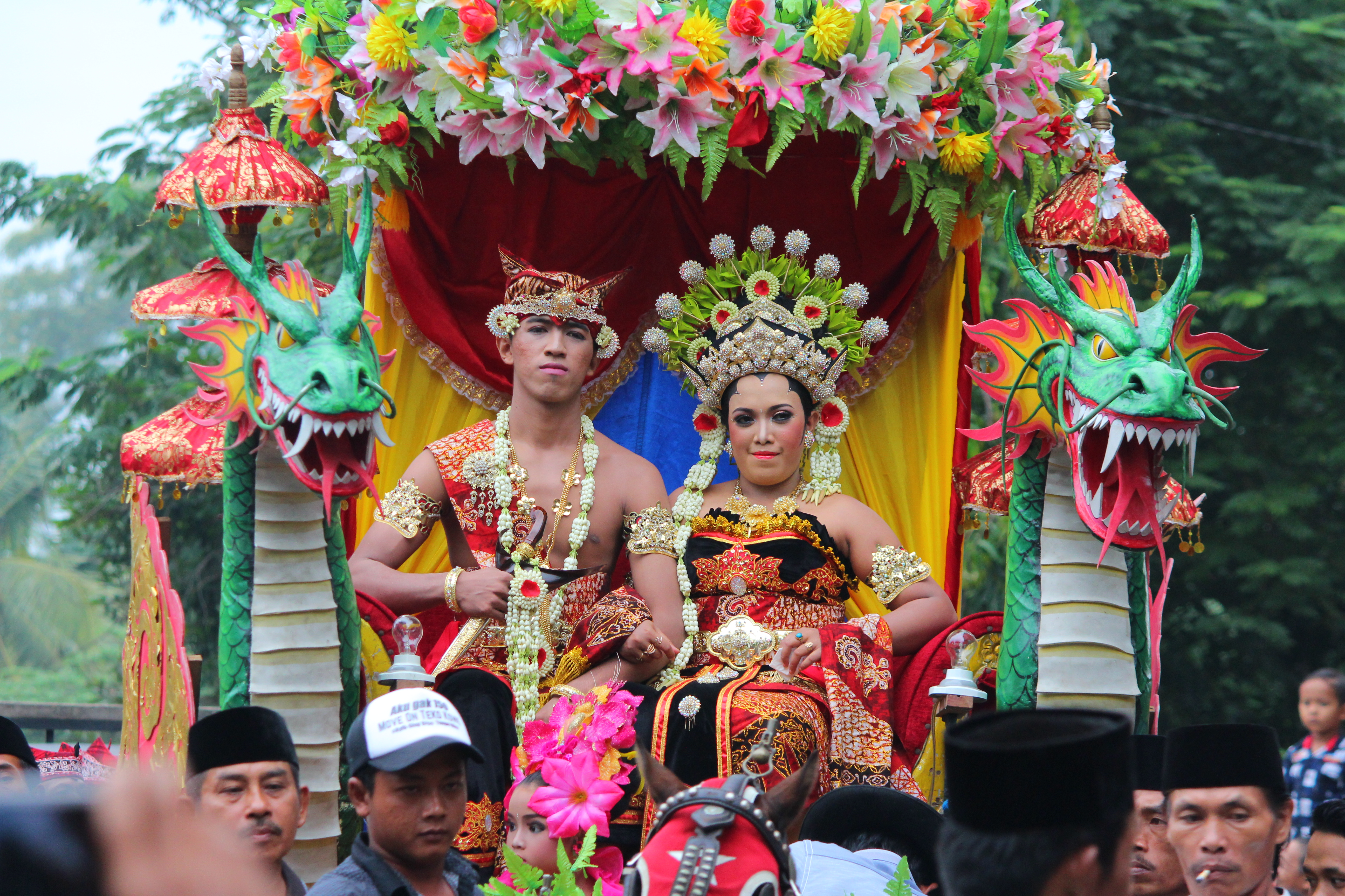 Ini adalah pawai kemanten suku using memakai baju adat "Mupus Baren Blambangan"